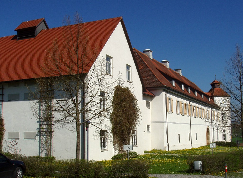 Schloss Filseck, Ostflügel und im Vordergrund das neue Wirtschaftsgebäude